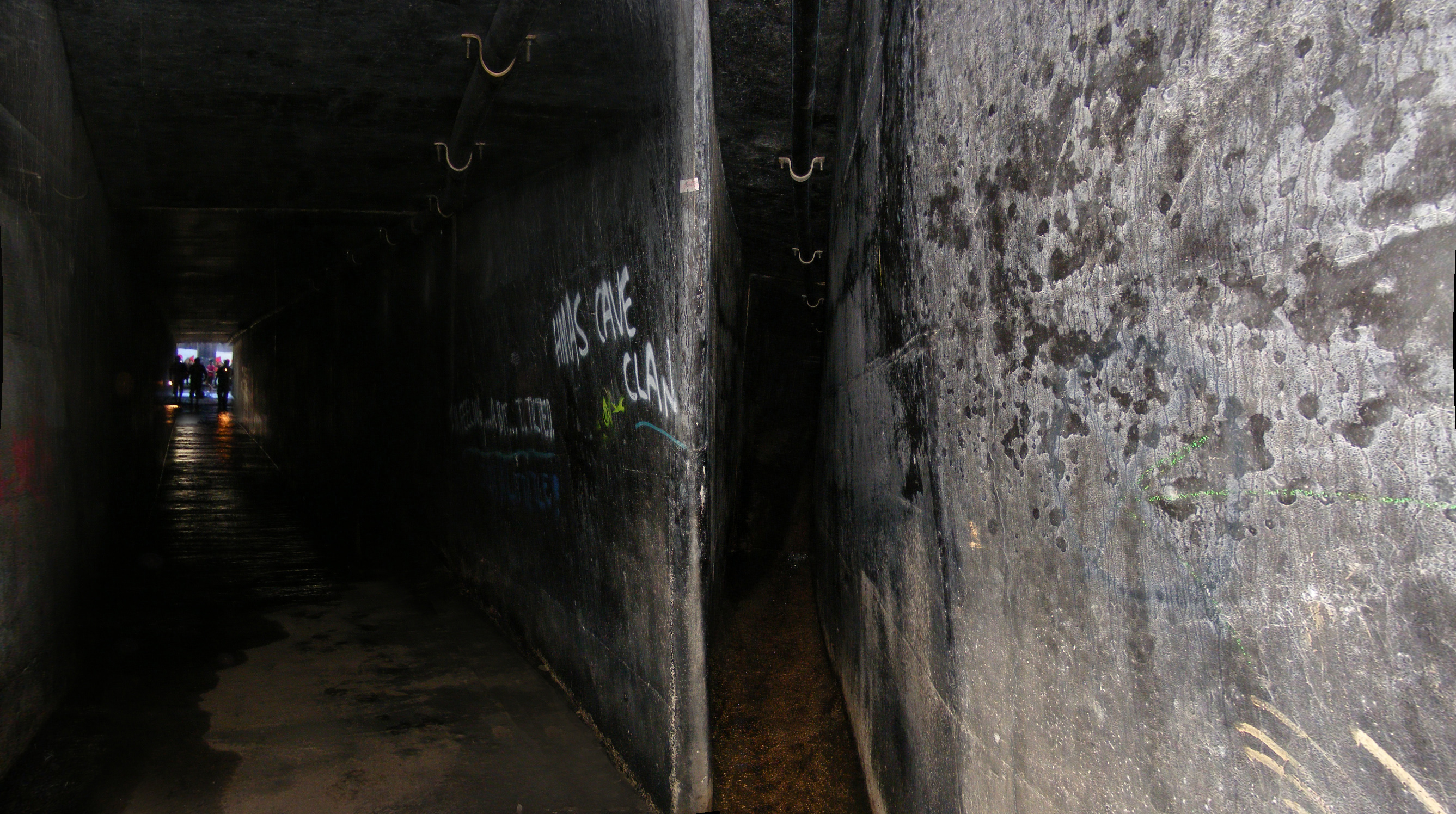 Drain